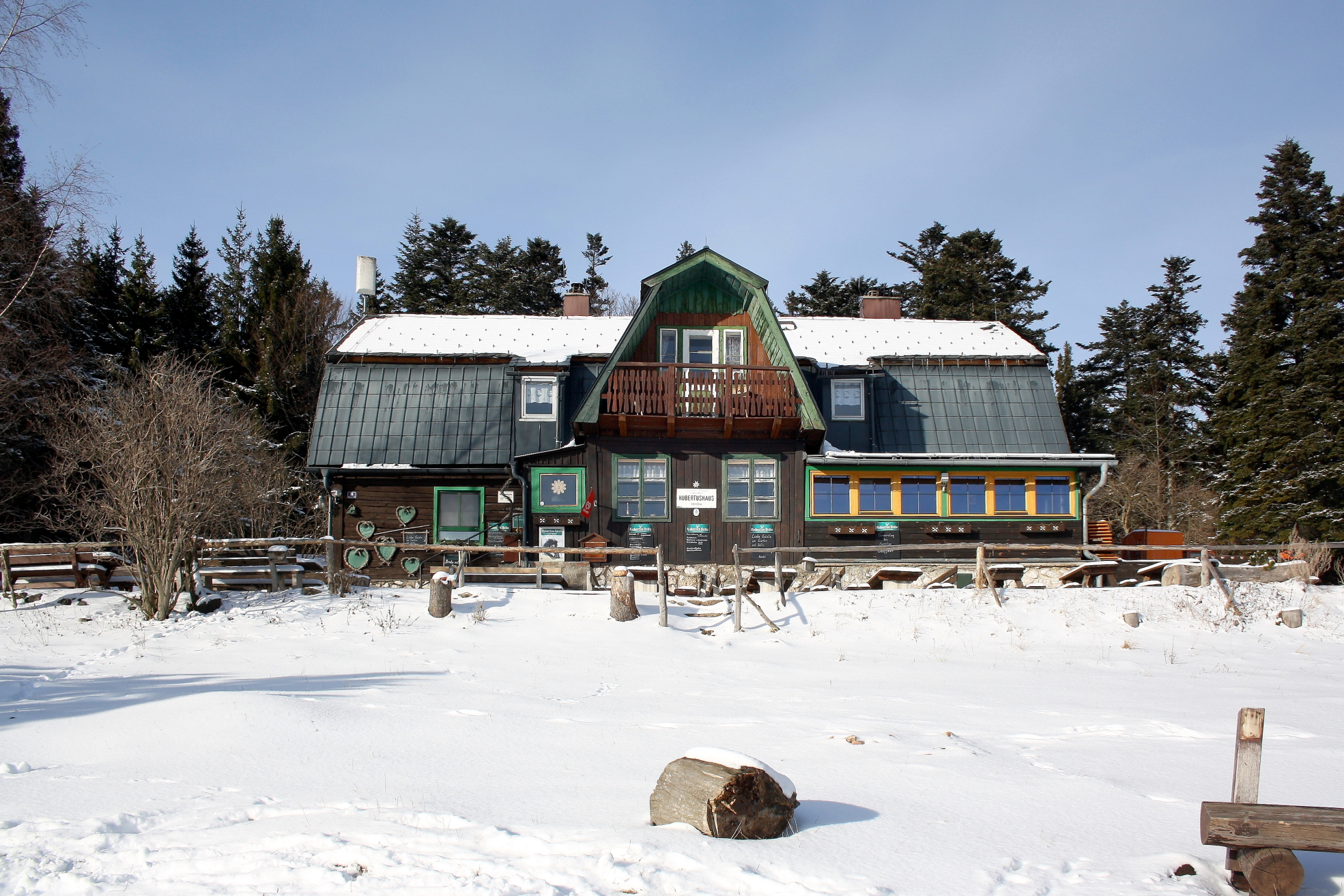 Das Hubertushaus auf der Hohen Wand in Niederösterreich.